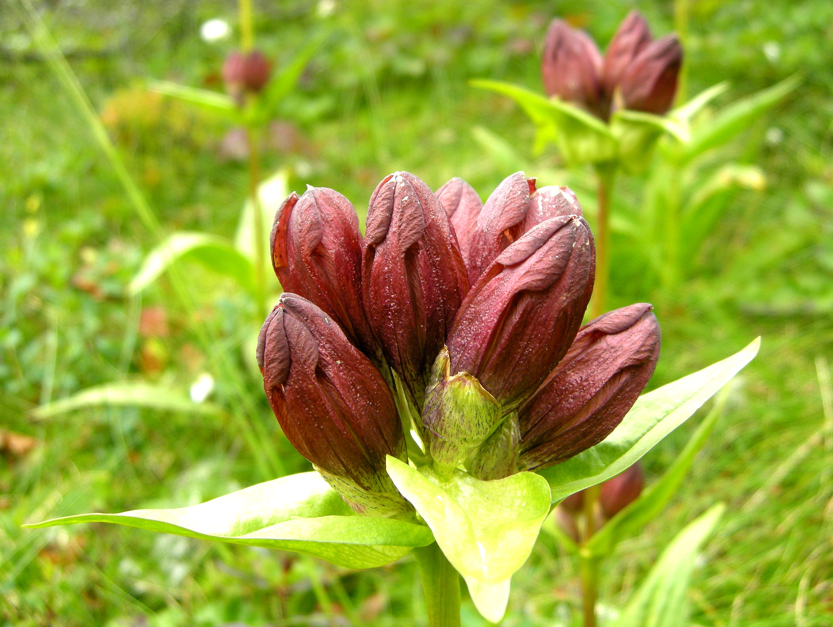 Søterot - Gentiana Purpurea funnet på Blefjell Purple Gentian, Purpur-Enzian, Gentiane pourpre, Purpergentiaan, Baggsöta